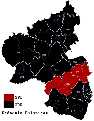 Districts de Rhénanie-Palatinat en 2009.